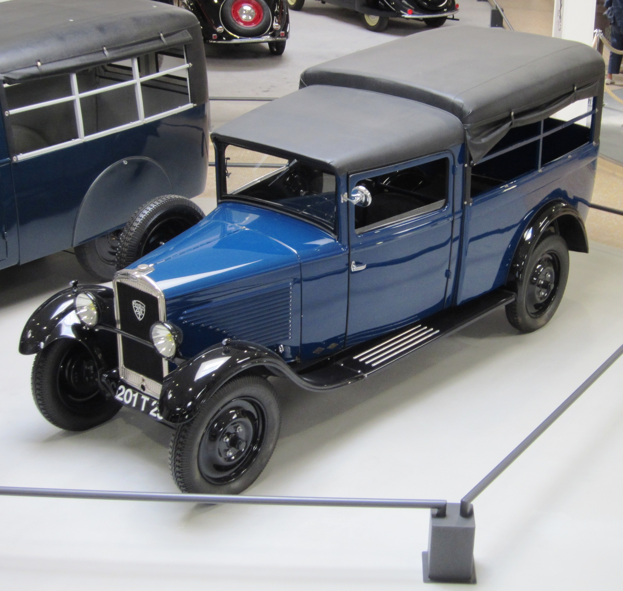 Peugeot 201T Boulangère vers 1933